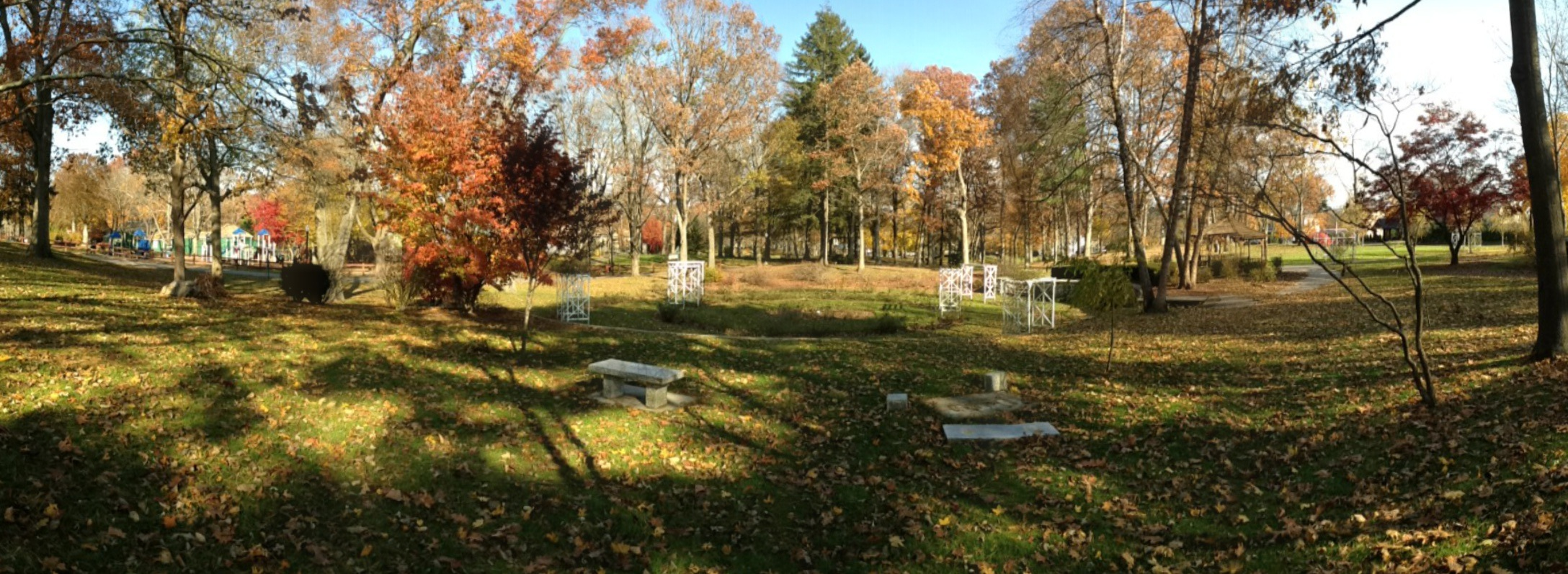 CAPRON PARK ZOO